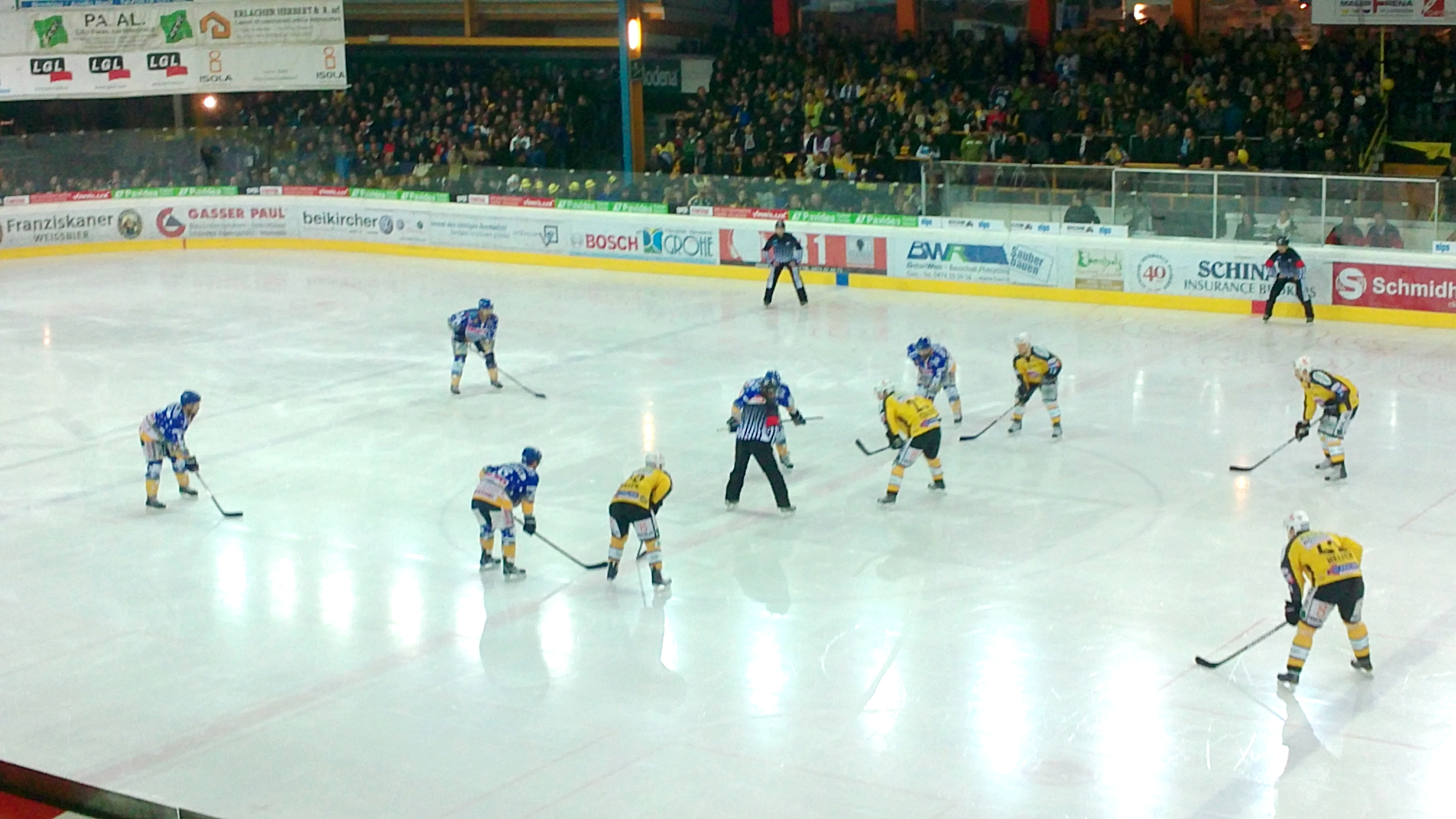 Erster Puckeinwurf Finalspiel 2010/11 Pustertal-Asiago in der Brunecker Leitner Solar Arena um 20:30 Uhr